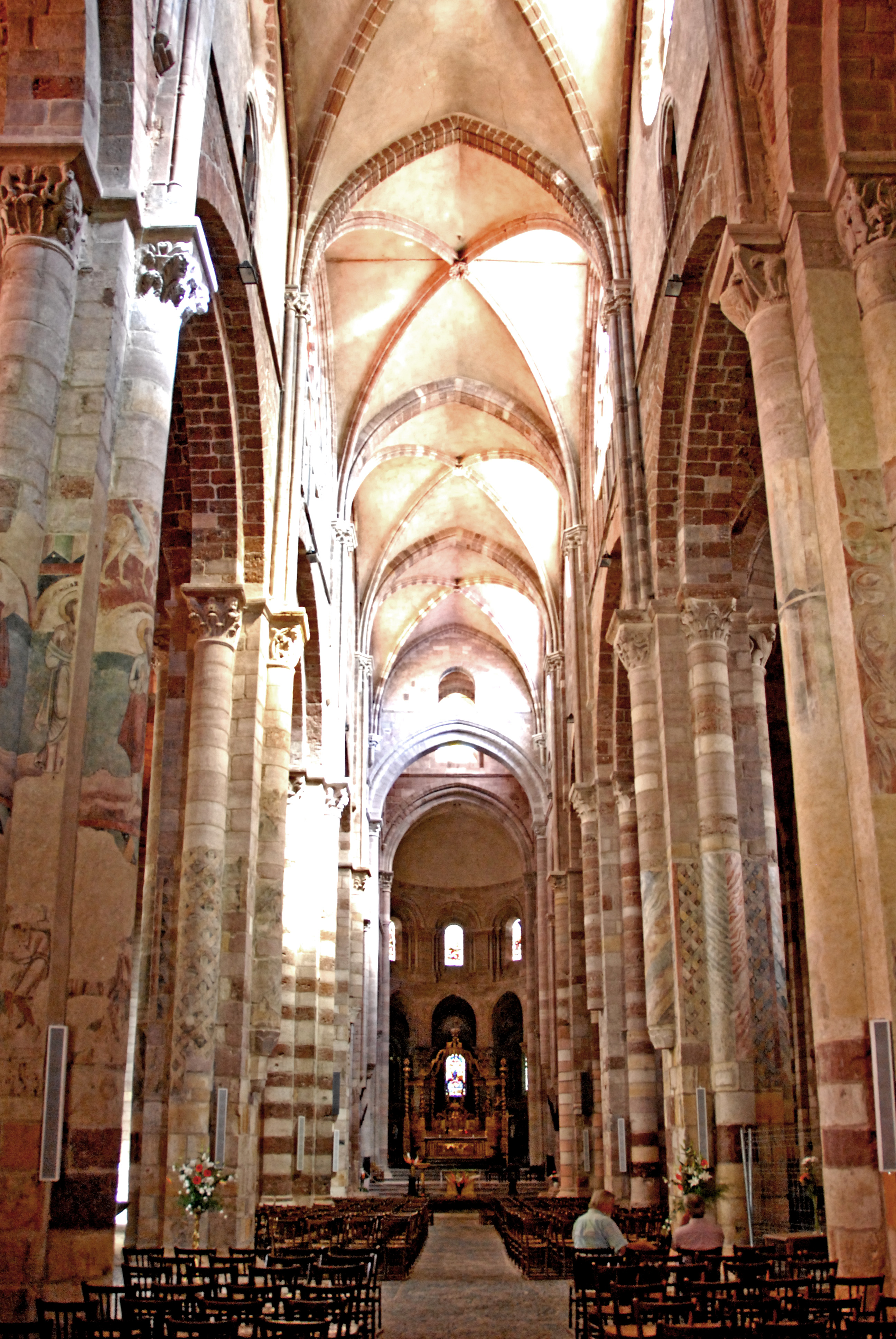 Sain-Julien Brioude, Mittelschiff zum Chor